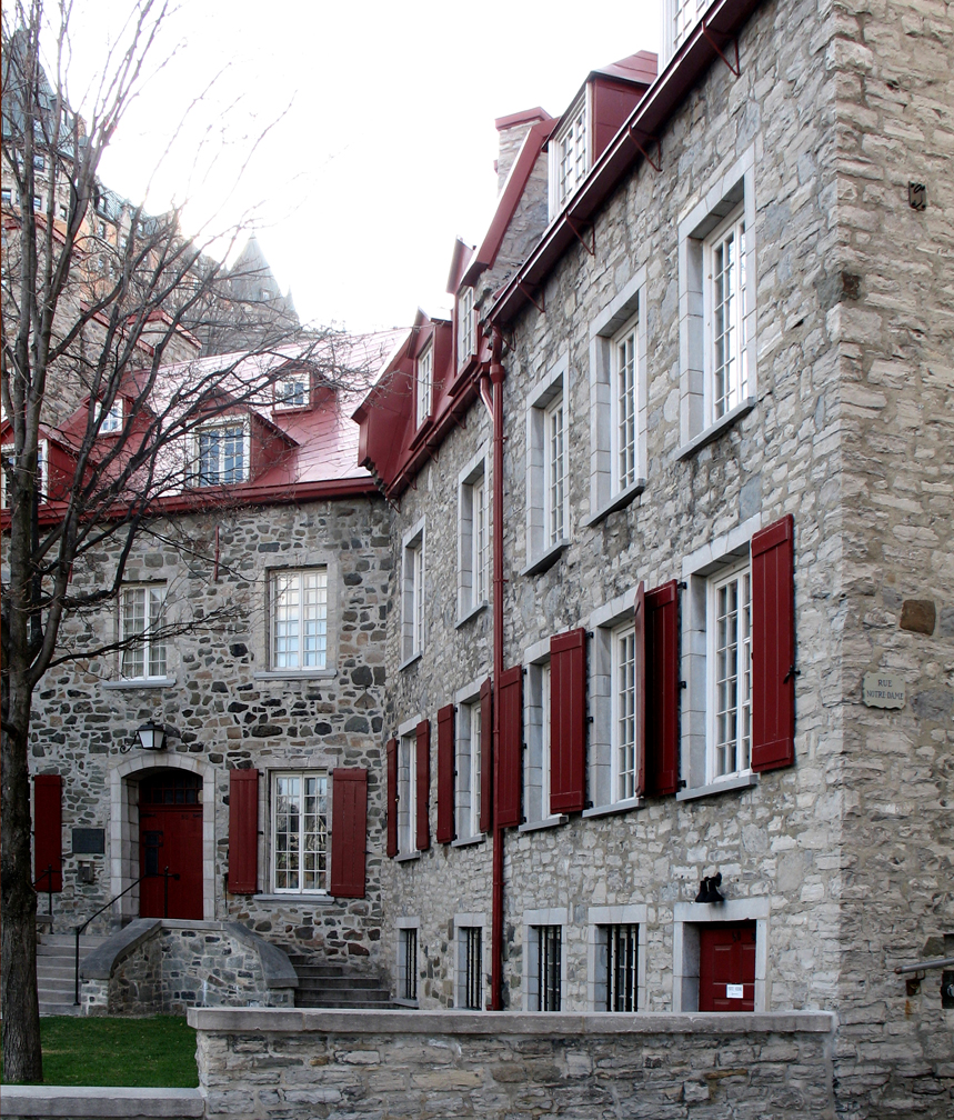 Maison Chevalier, rue du Marché-Champlain et de la rue du Cul-de-Sac à Québec (Québec) Canada. Ensemble historique de quatre maisons (1683-1752-1960)